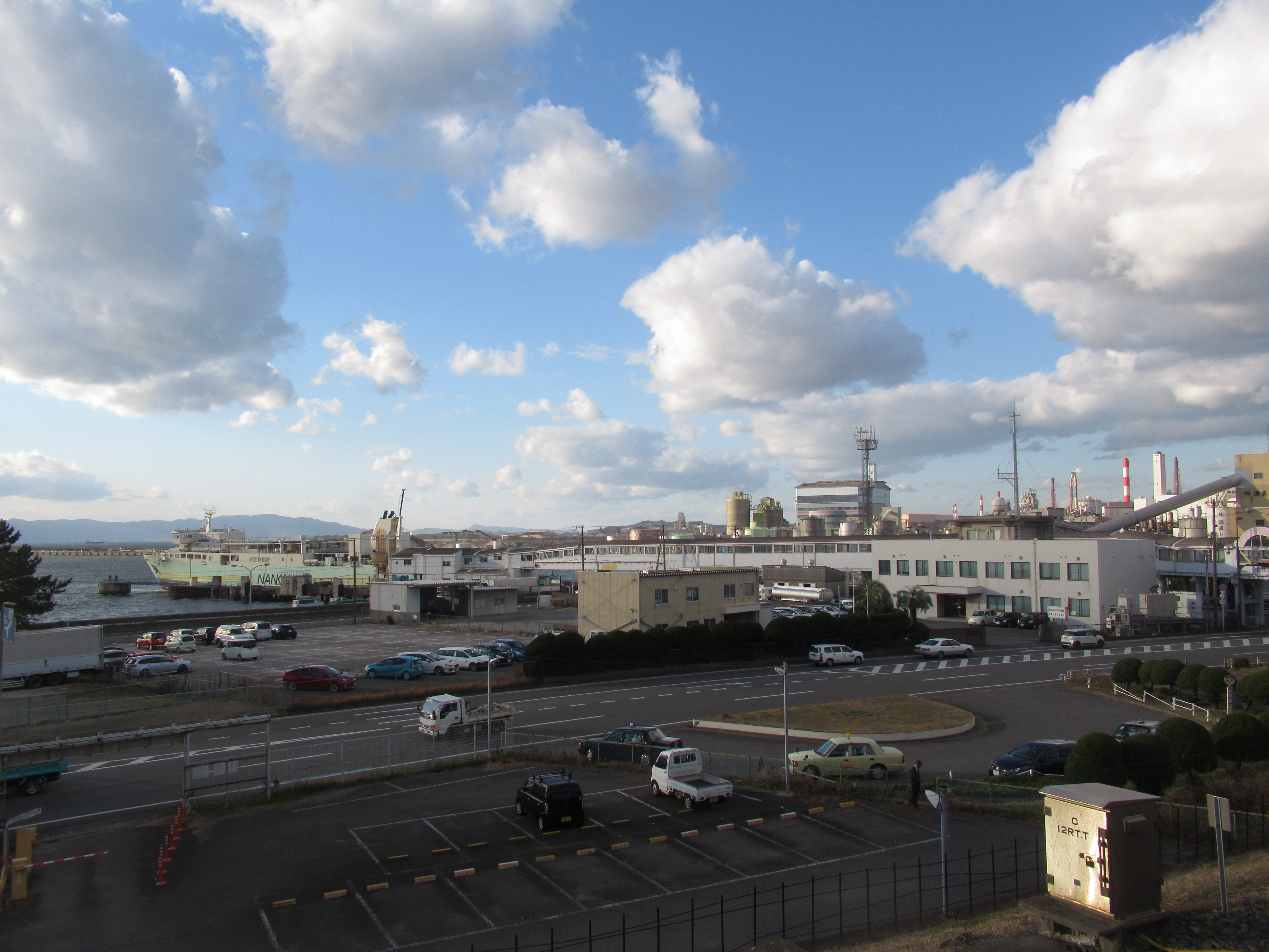 和歌山港を南海和歌山港駅から眺める。